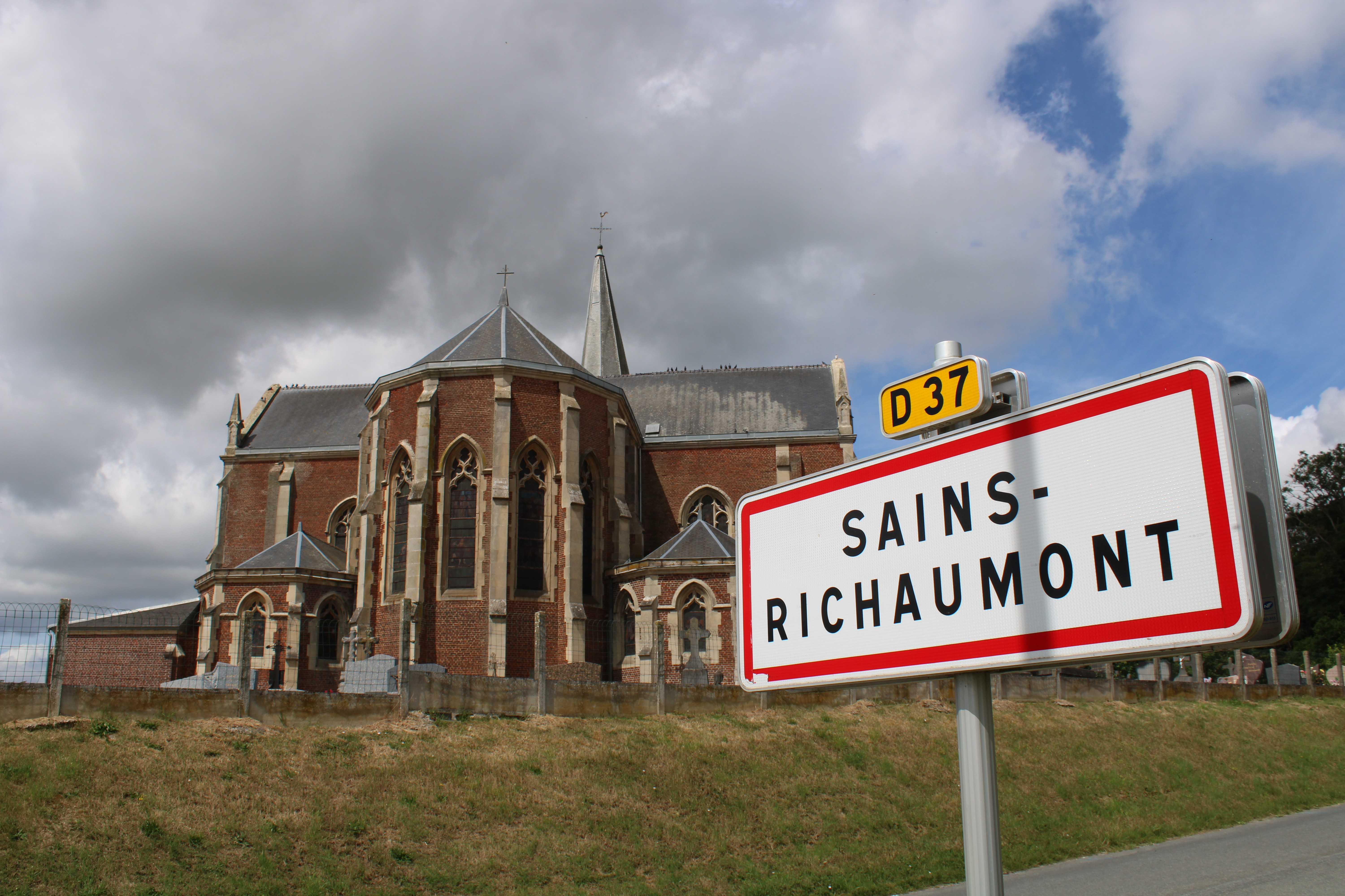 Entrée du village